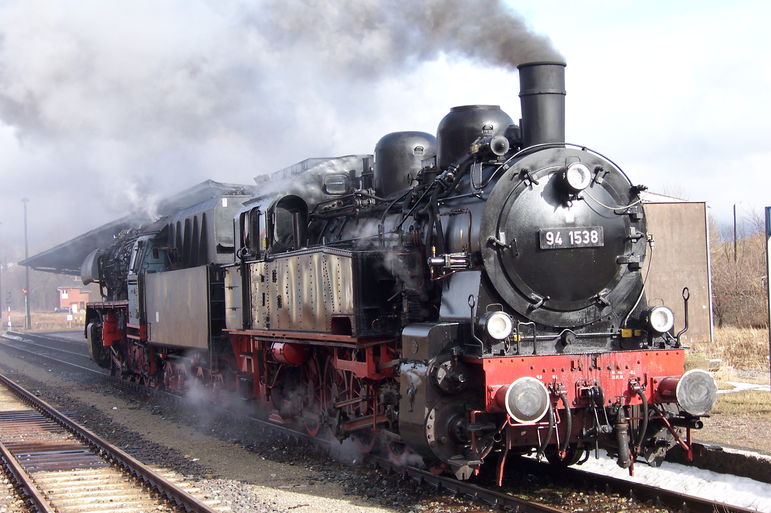 Lokomotive 94 1538 im Ilmenauer Bahnhof, angekoppelt im Hintergrund Lokomotive 50 3648-8.